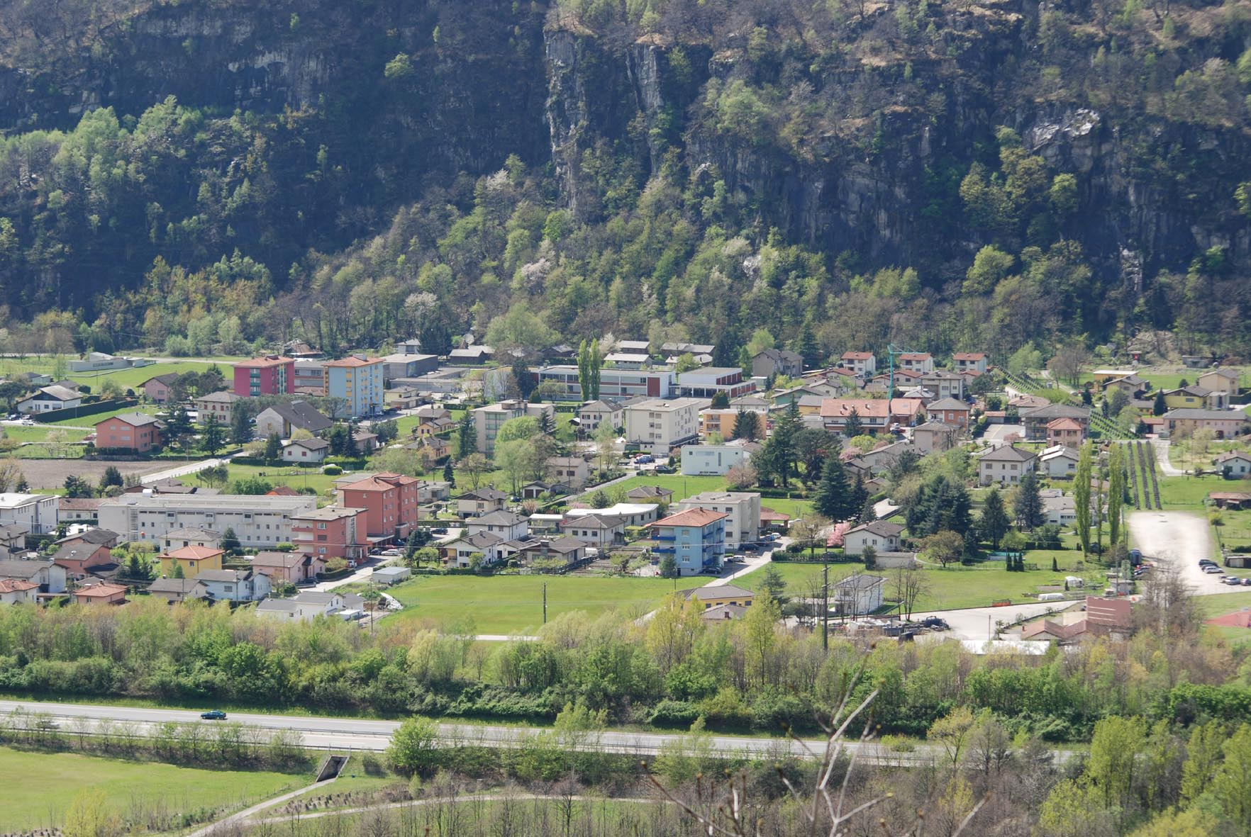 Data 19 aprile 2008